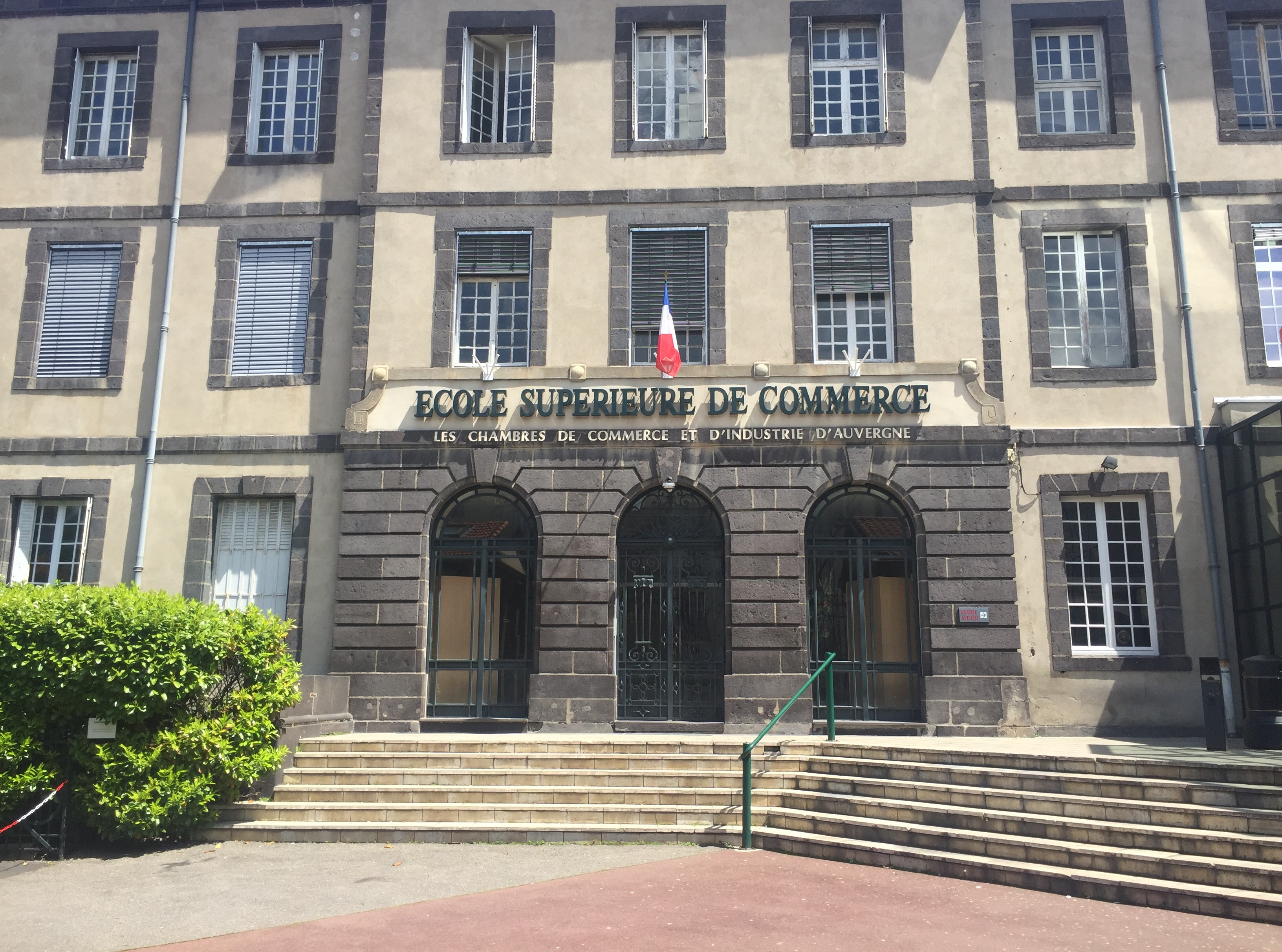 ESC de Clermont-Fd.